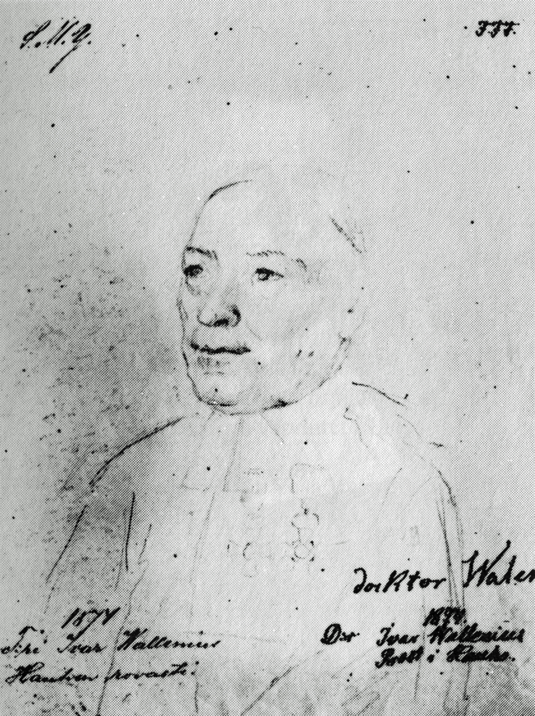 Prosten, teol.doktor. Ivar Wallenius. Teckning av R.W. Ekman efter Emanuel Thelnings målning 1812.